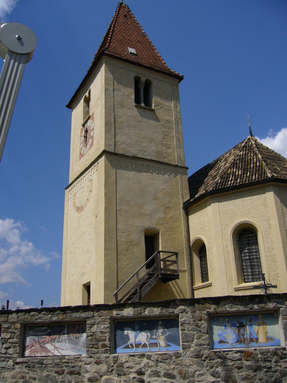 Kirche in Plaus, Südtirol, Italy